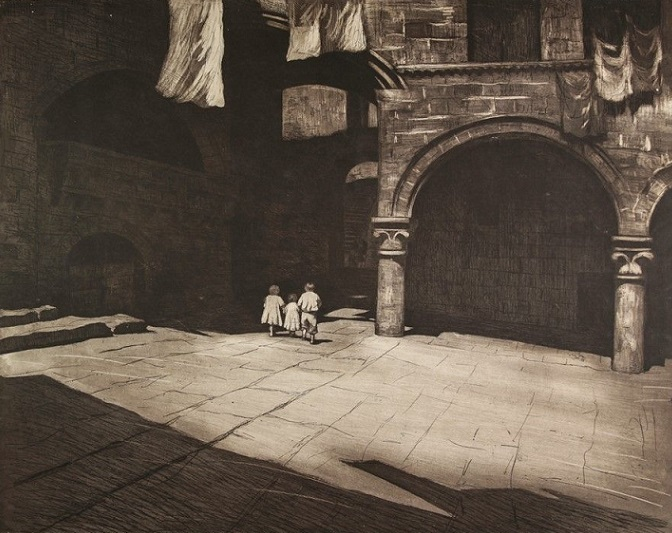 "Viterbo", acquaforte. cm 45.5 x 57 firmata, coll. privata